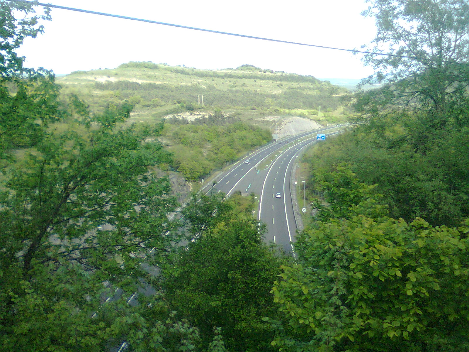 Autovía N-622 (que enlaza Vitoria con la Autopista A-68) desde el puerto de Aiurdin (Álava, España).